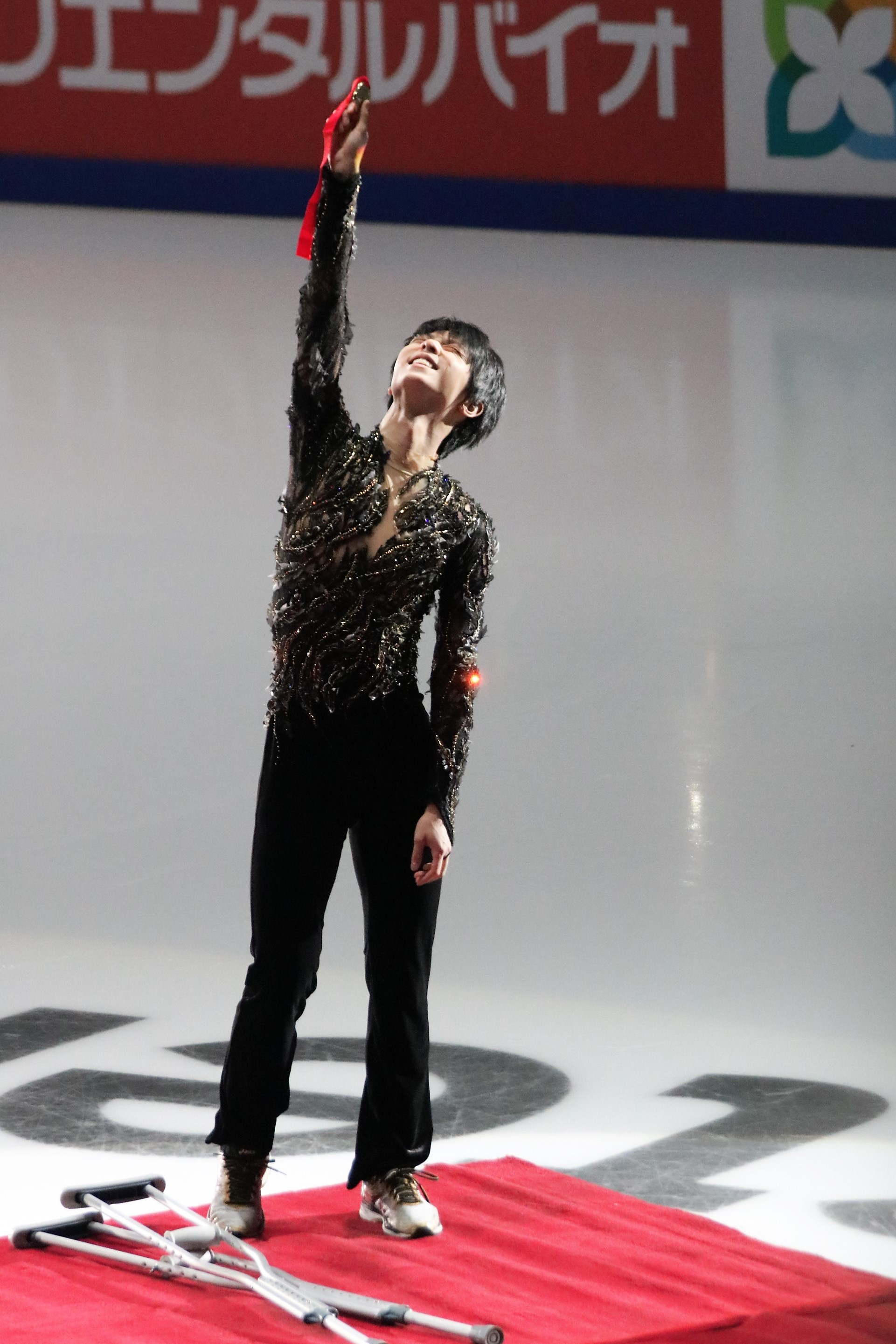 Юдзуру Ханю (Япония) на церемонии награждения Rostelecom Cup 2018